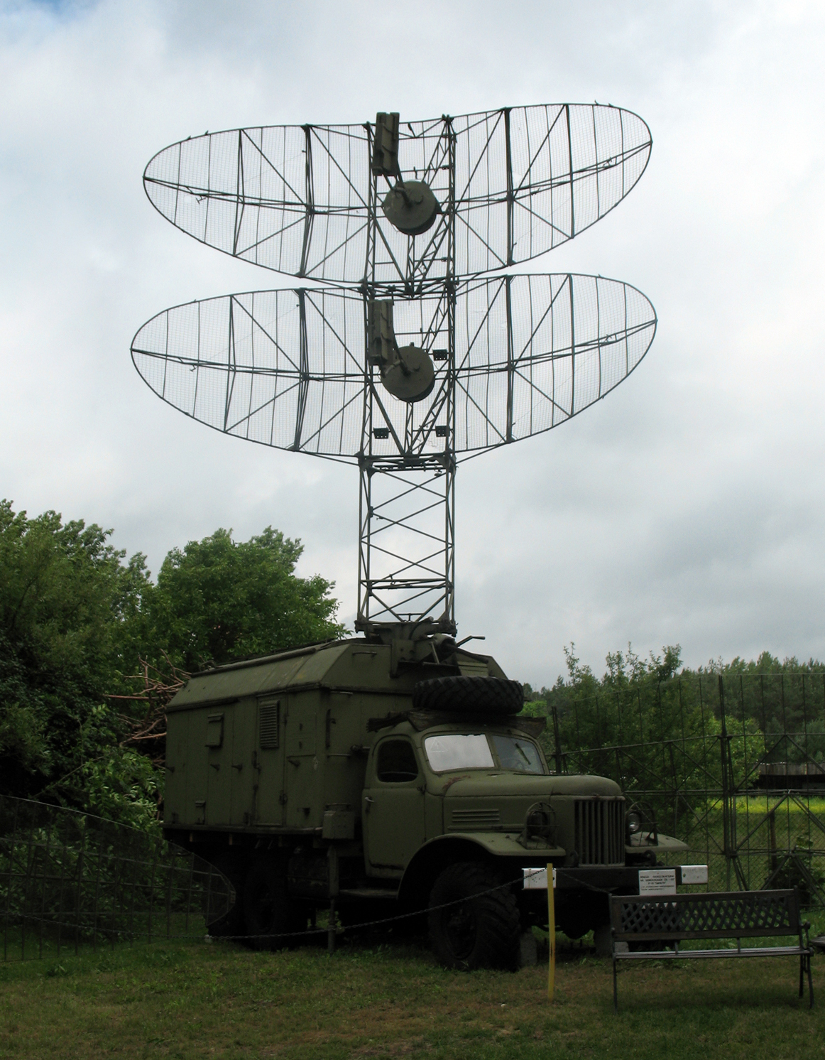 Stacja radiolokacyjna "Danuta" konstrukcji polskiej, na ciężarówce Ził-157. Ze zbiorów Lubuskiego Muzeum Wojskowego w Drzonowie.